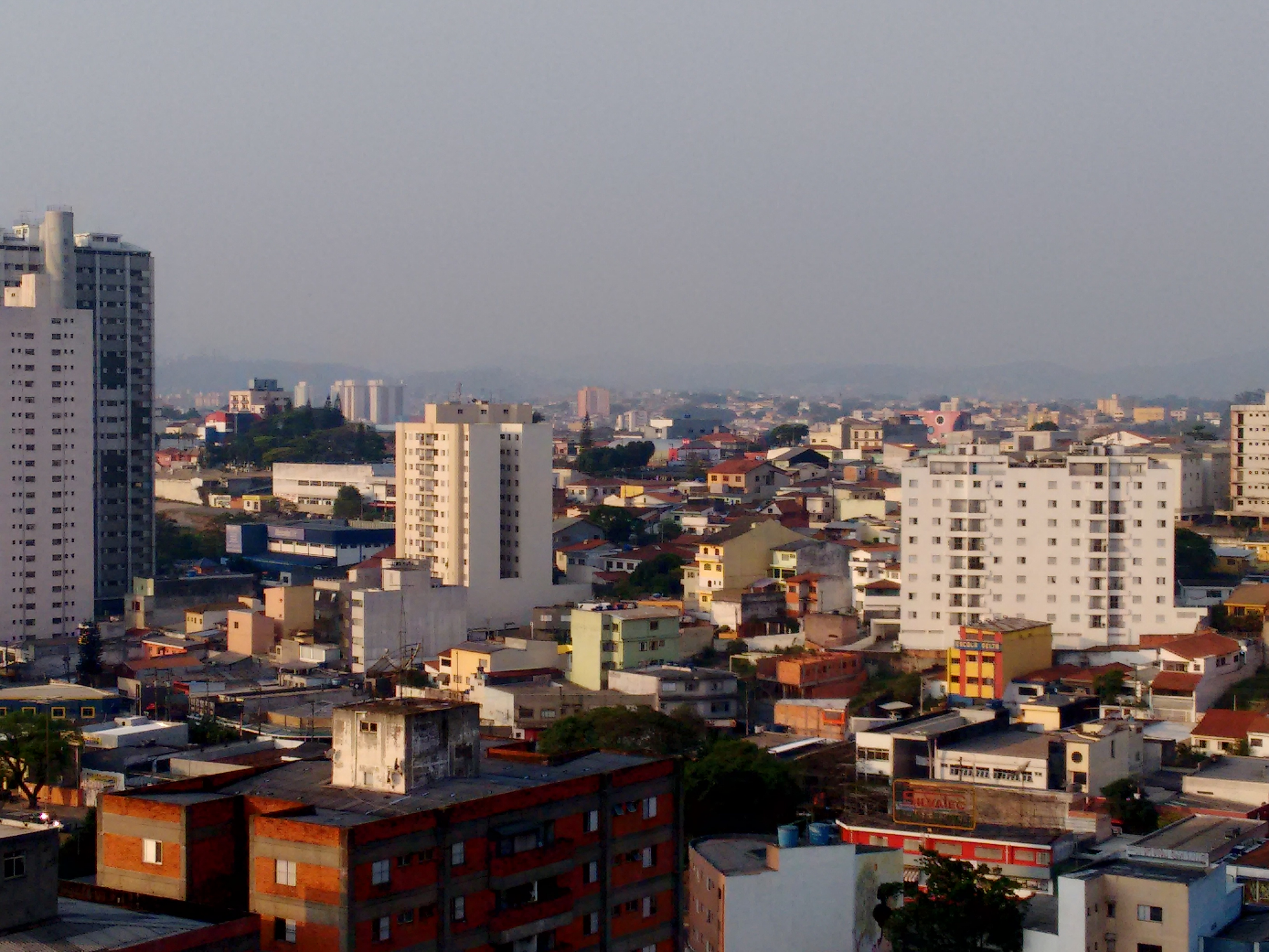 Guarulhos